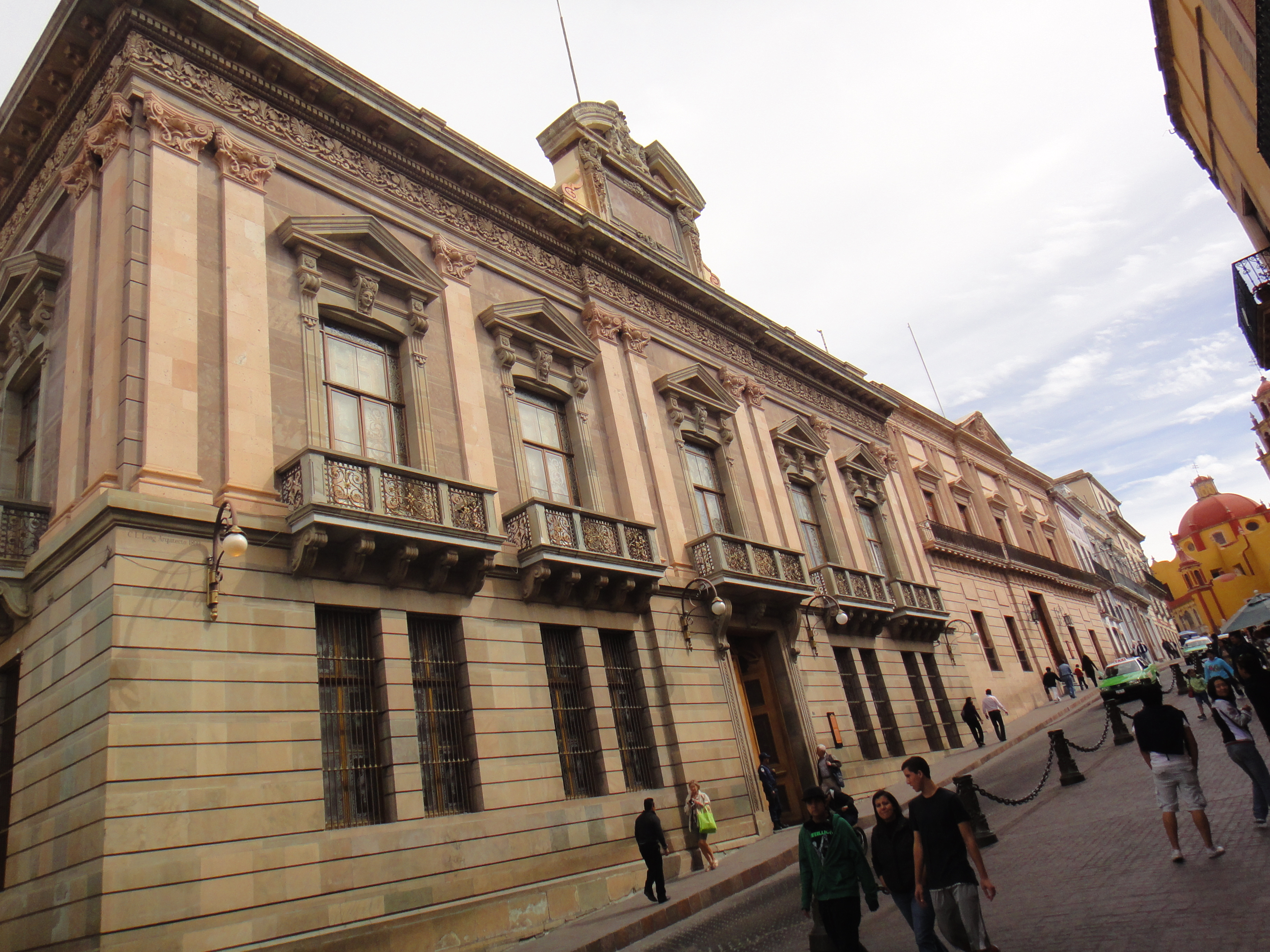 Una plaza en guanajuato